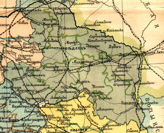 Седлецкая губерния в 1896 году